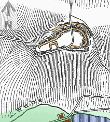 Die Burgwälle im Elm, Skizze (Ausschnitt) aus dem Buch Braunschweiger Volkskunde, Richard Andree, 1901